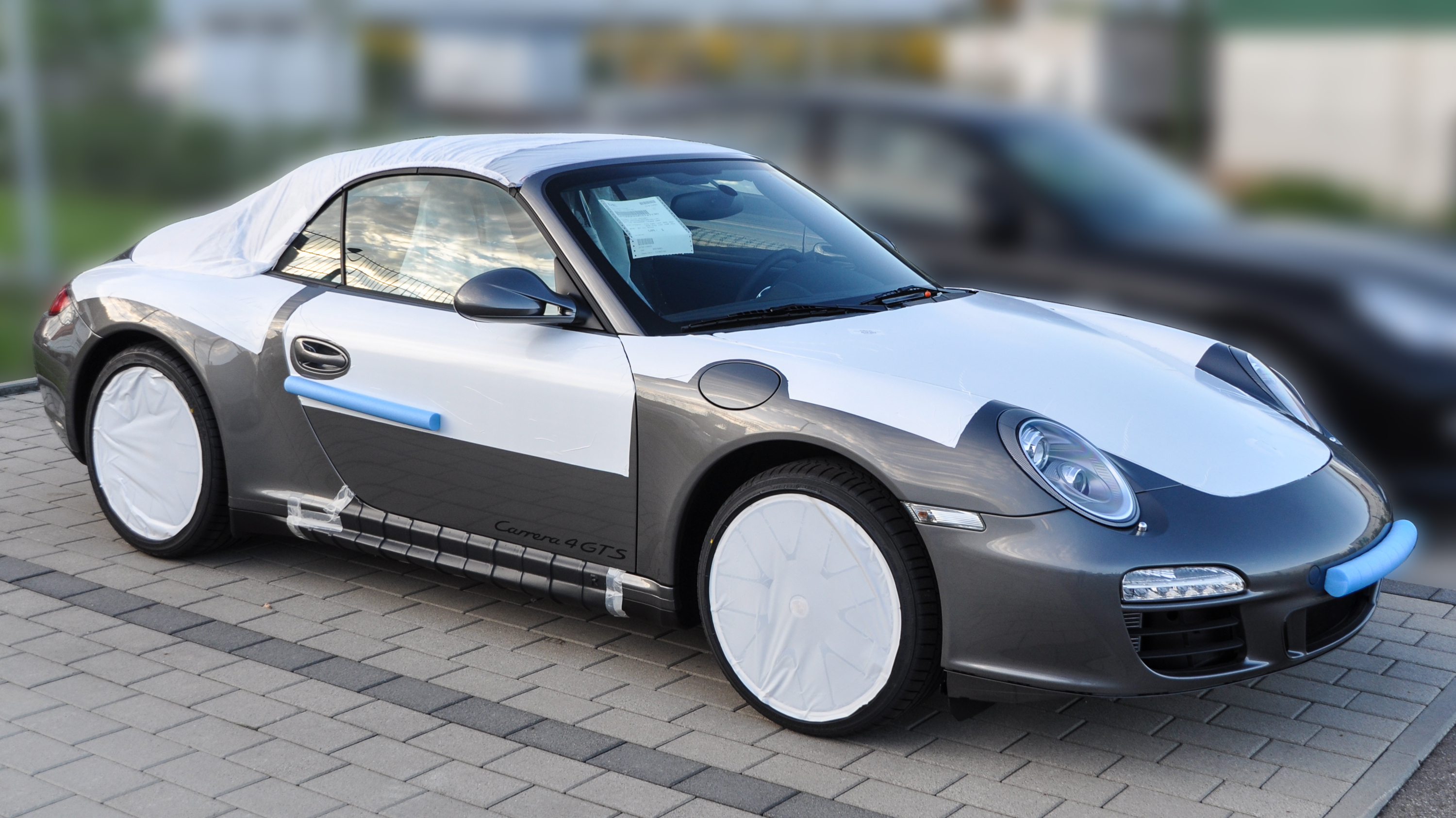 Ein Porsche 911 Carrera 4 GTS Cabrio (BR 997 facelift) in der Originalverpackung.